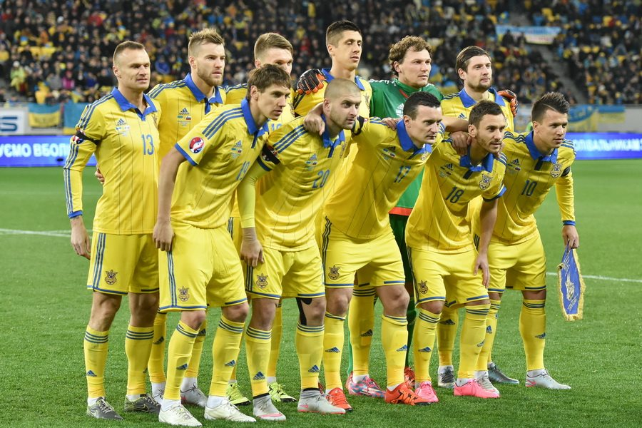 Склад збірної України перед матчем Україна-Словенія